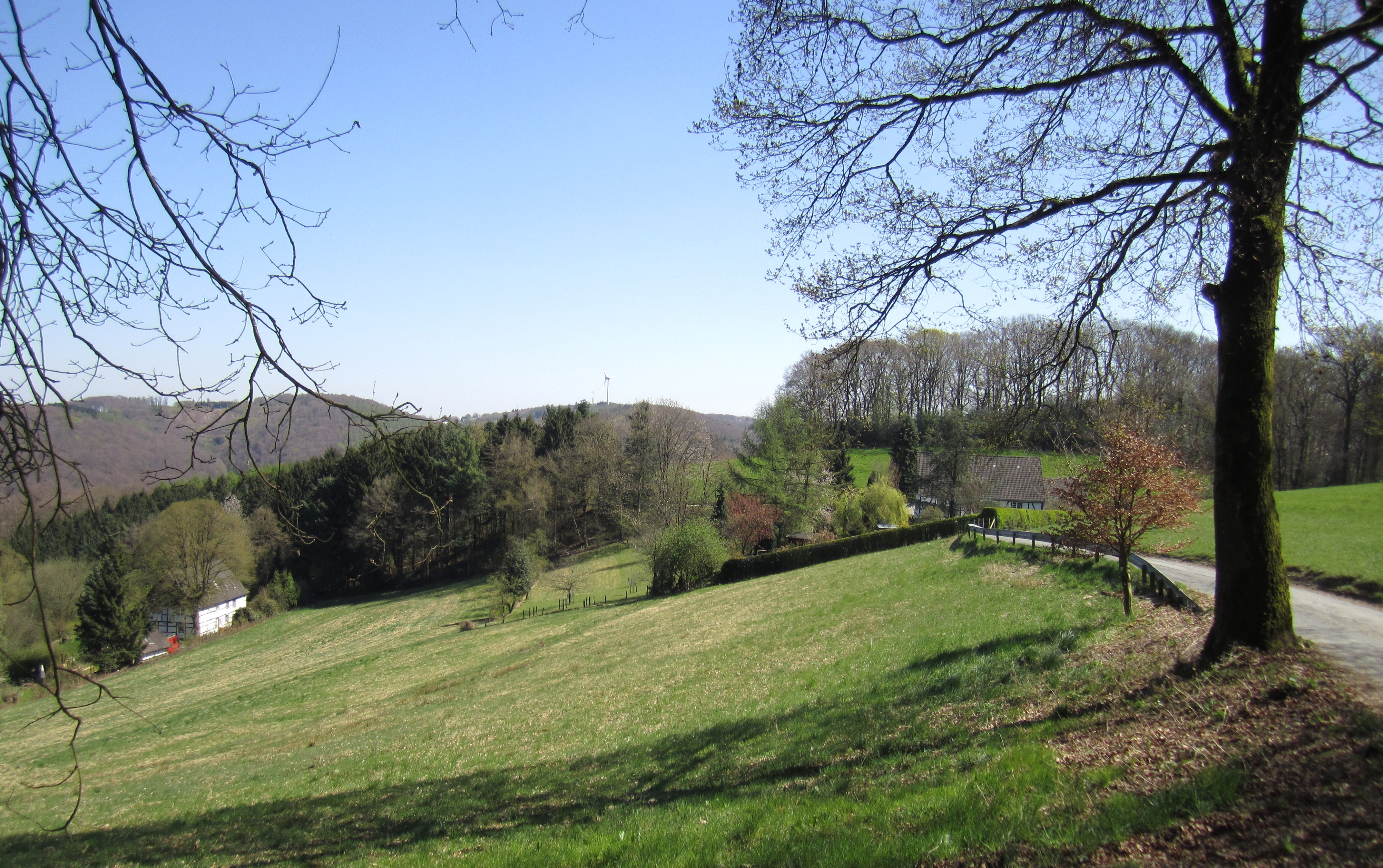 Höhenweg im Hattinger Ortsteil Niederelfringhausen, links in Hanglage der Hof Vosloch, rechts Küppers Kotten und Grünenthals Kotten. Der abgebildete Bereich liegt im Landschaftsschutzgebiet Niederbredenscheid/Elfringhausen.